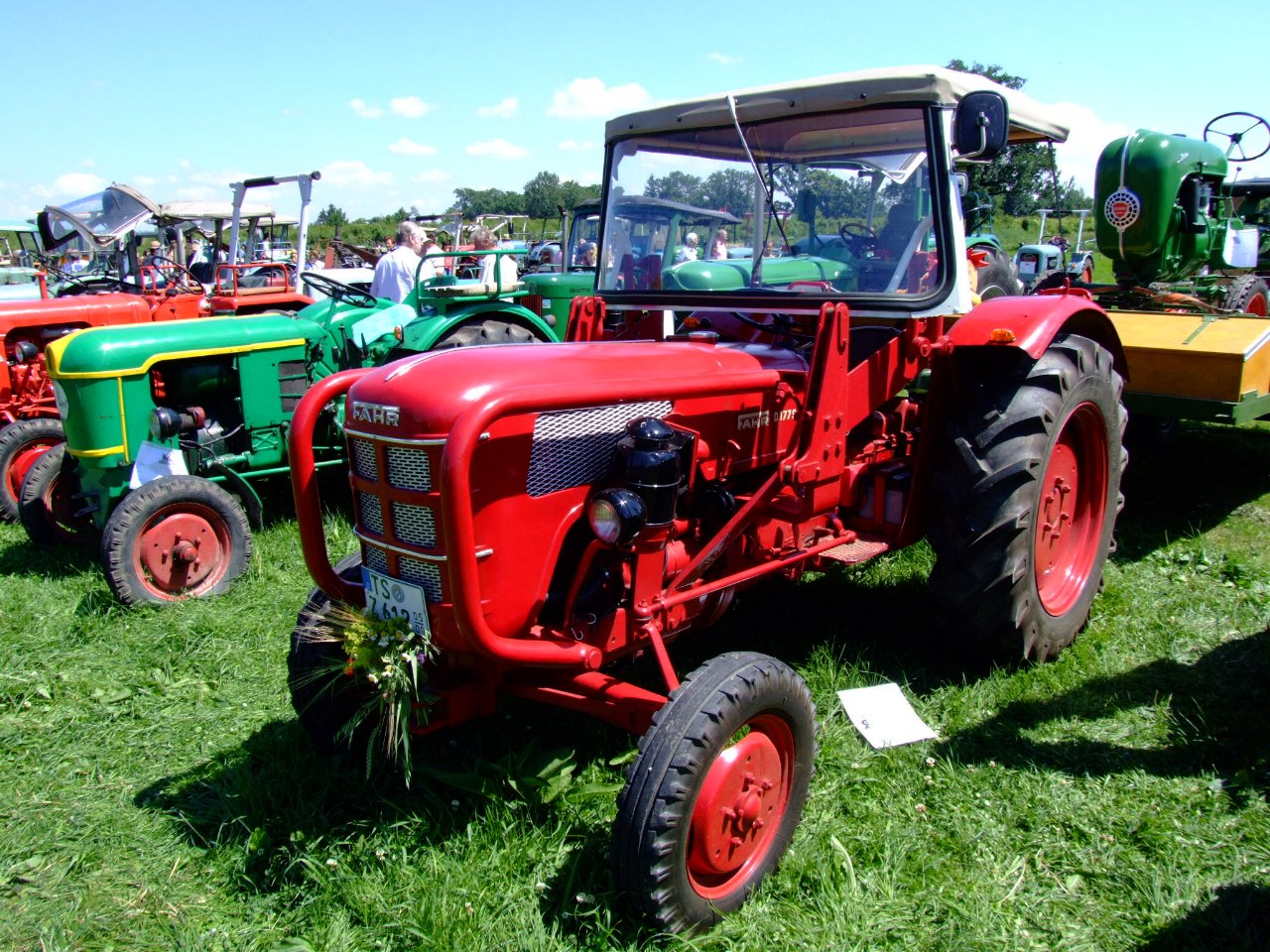 Fahr D177 S mit 34 PS, Baujahr 1959, Deutschland